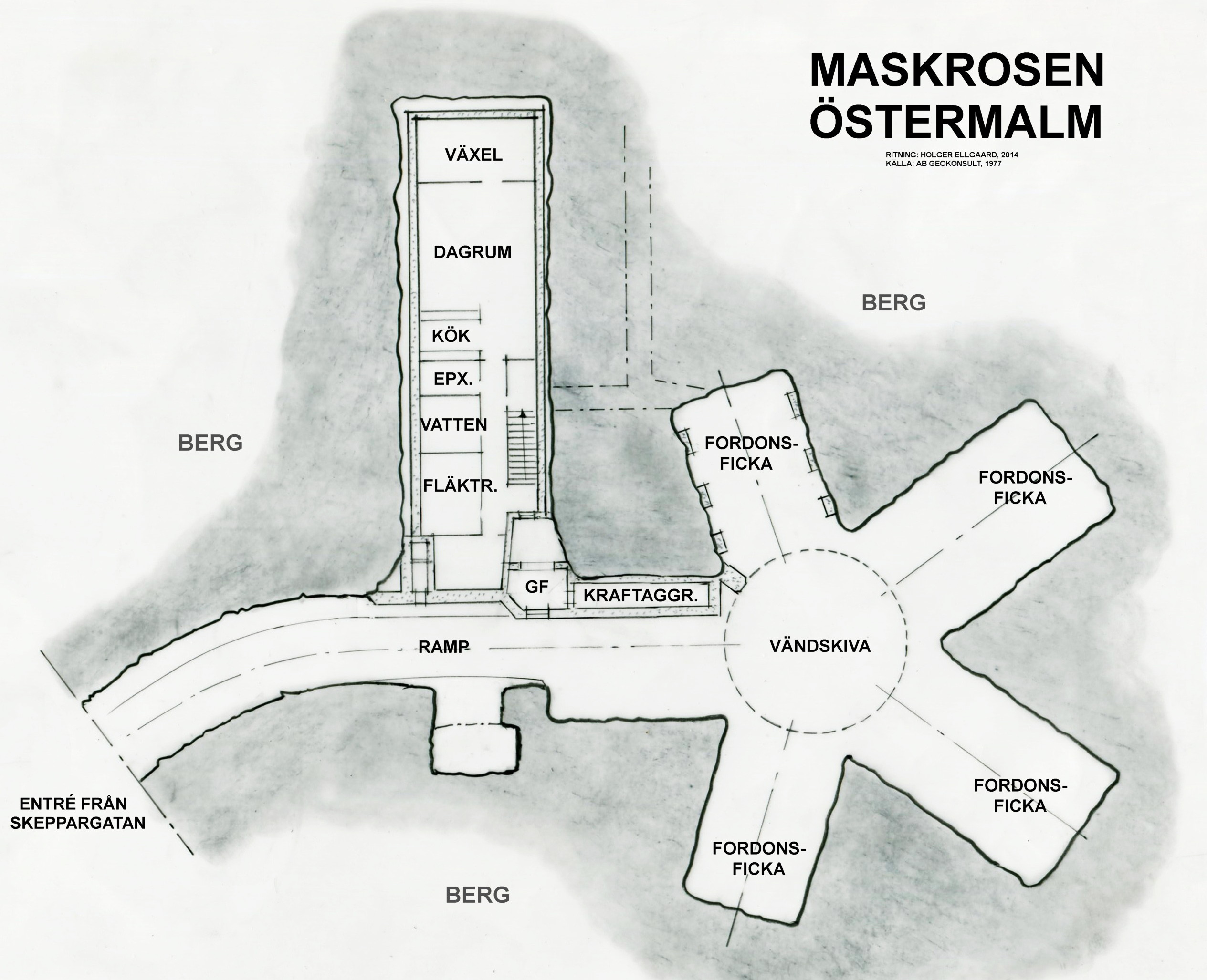 Framskjuten enhet (FE) "Mskrosen", ritning, källa: AB Geokonsult, 1977